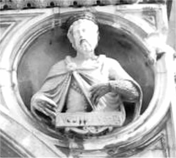 Monza angolo destro del protiro del Duomo con nel tondo il busto di Agilulfo